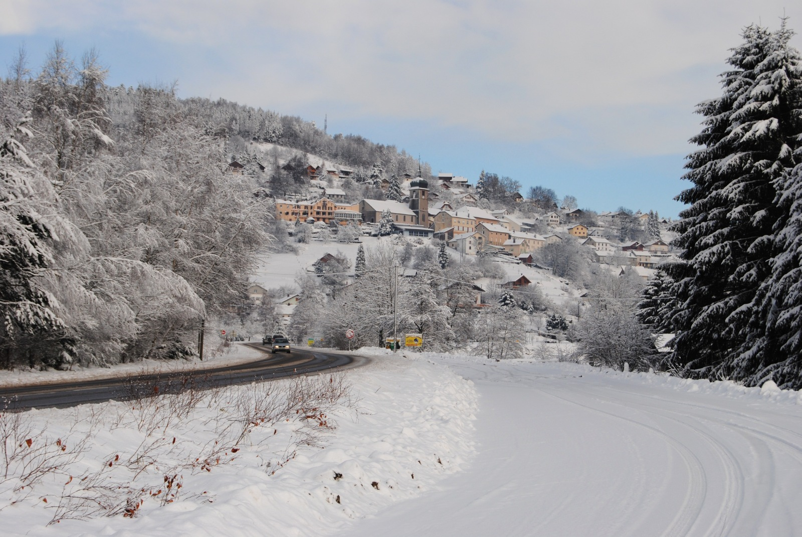 Le Tholy enneigé en novembre 2010